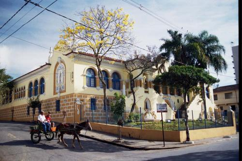 cidade de Caxambu, Minas Gerais, Brasil